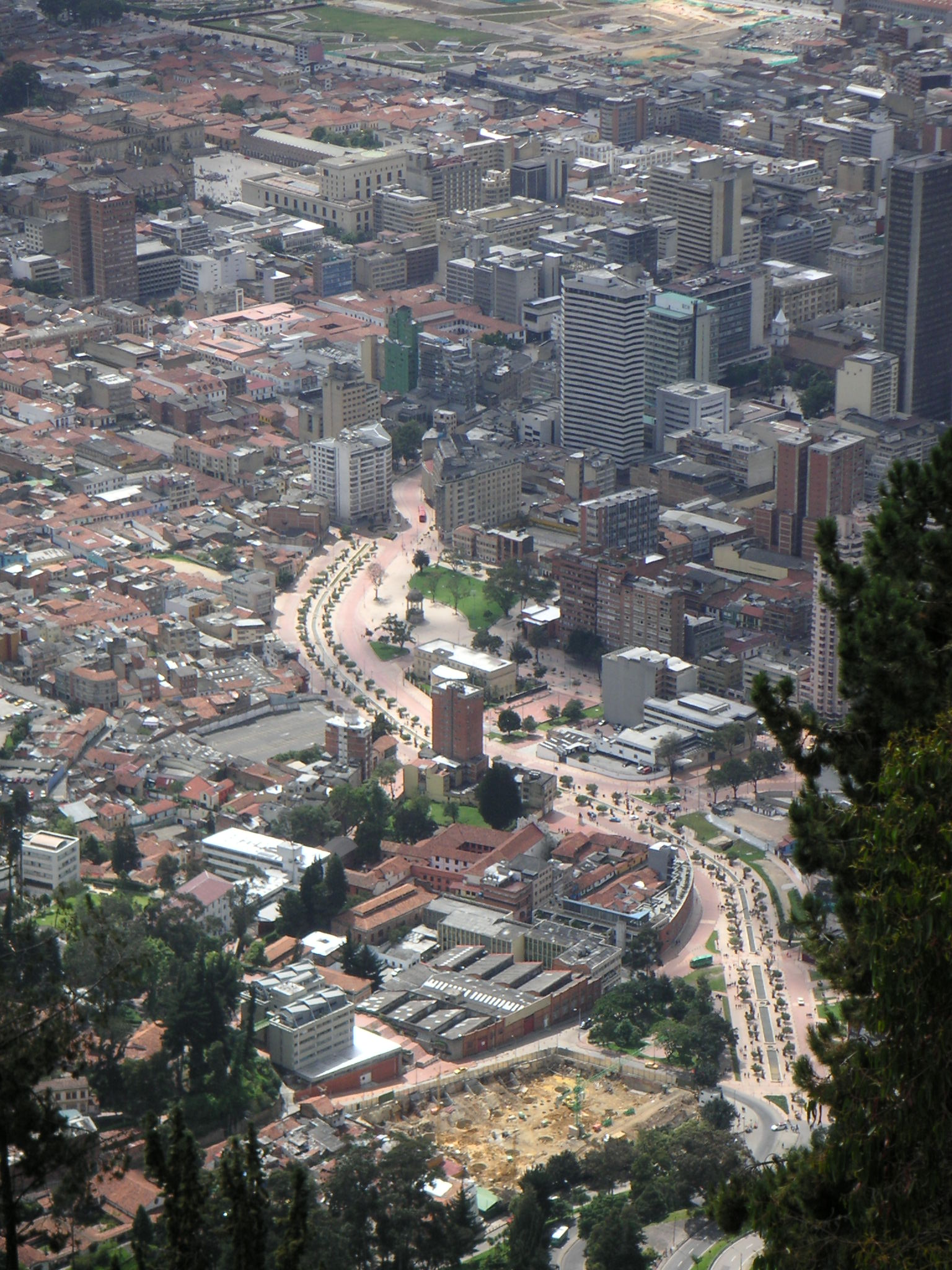 "Eje ambiental", Bogotá 01/2005, by darina